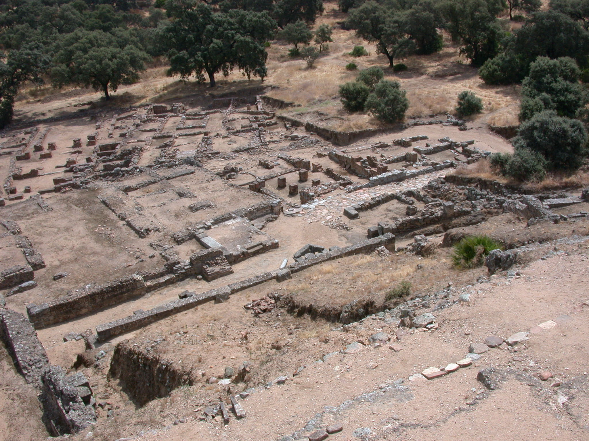 Blick auf die Häuser 2 (im Vordergrund), 1&6 in Munigua